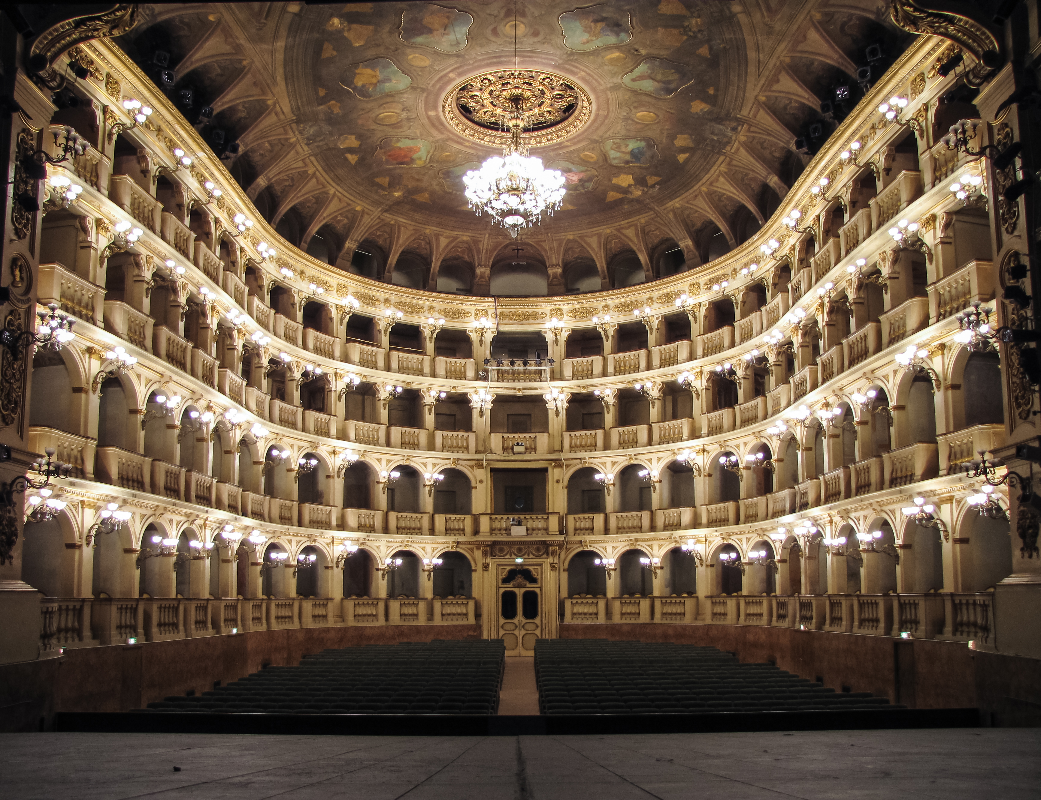 Sala Bibiena del Teatro Comunale di Bologna